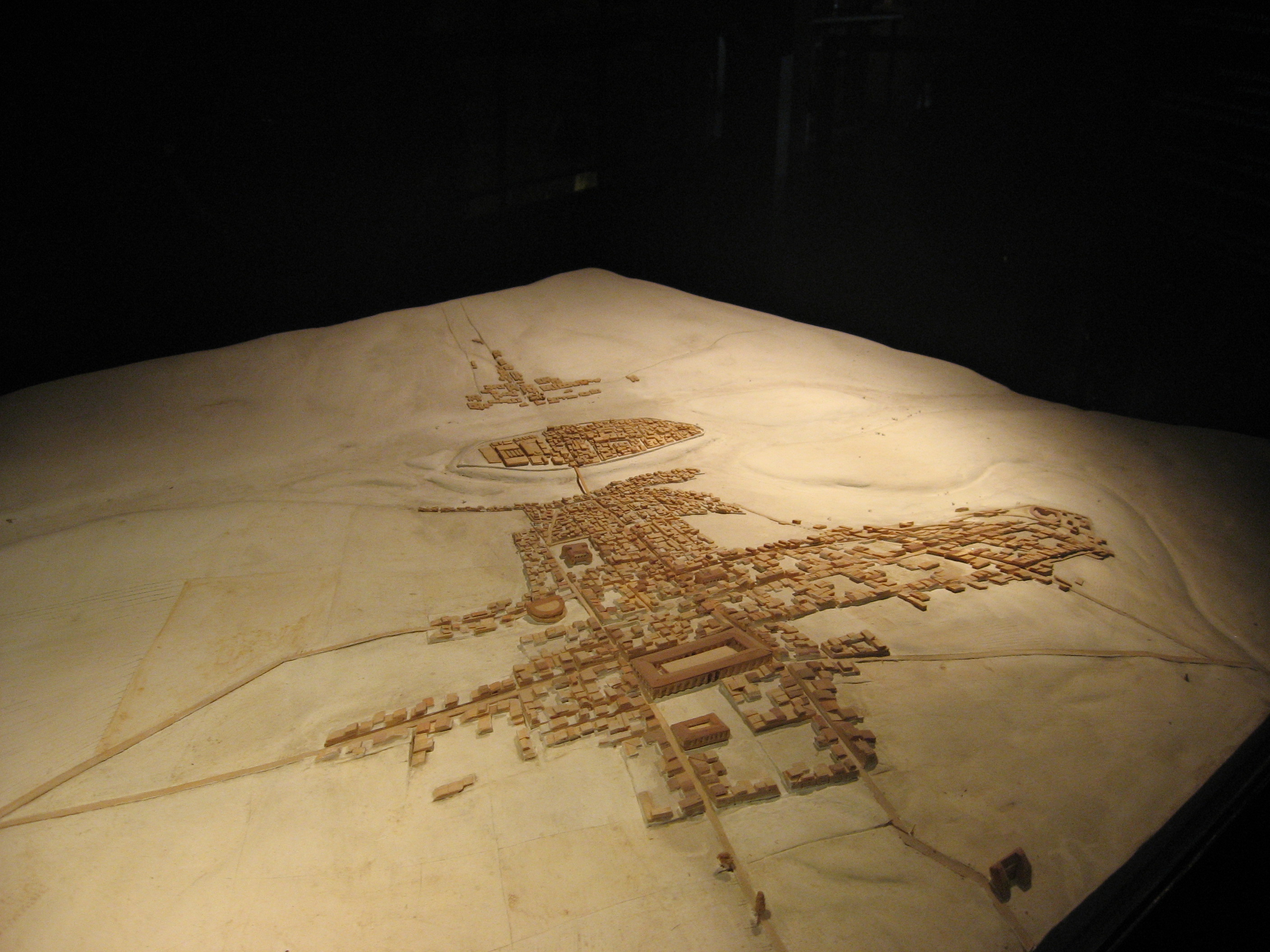 Eigen werk, foto van maquette in museum van Romeins Parijs onder het plein van de Notre Dame in Parijs, gemaakt op 17 april 2007.